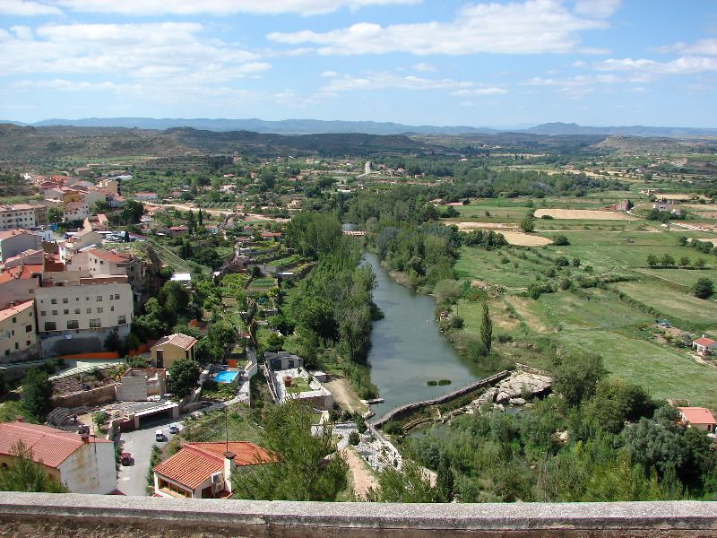 Alcañiz